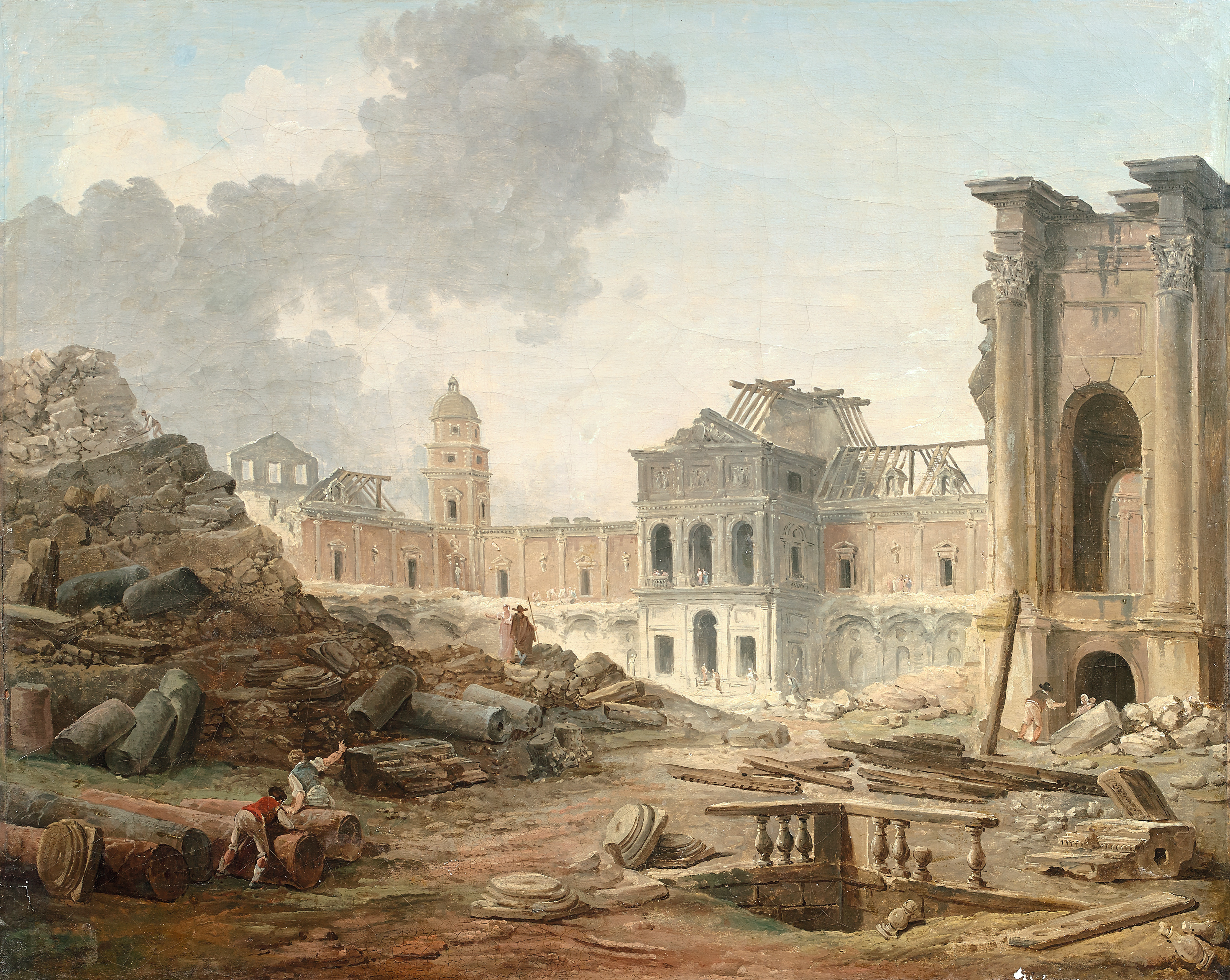 "Esquisse terminée" de la démolition du château de Meudon, Hubert Robert, vers 1804. Vente aux enchères du 27 septembre 2016 à Nantes, étude COUTON VEYRAC JAMAULT, lot 30. mesures : 59 x 74 cm (sans cadre)